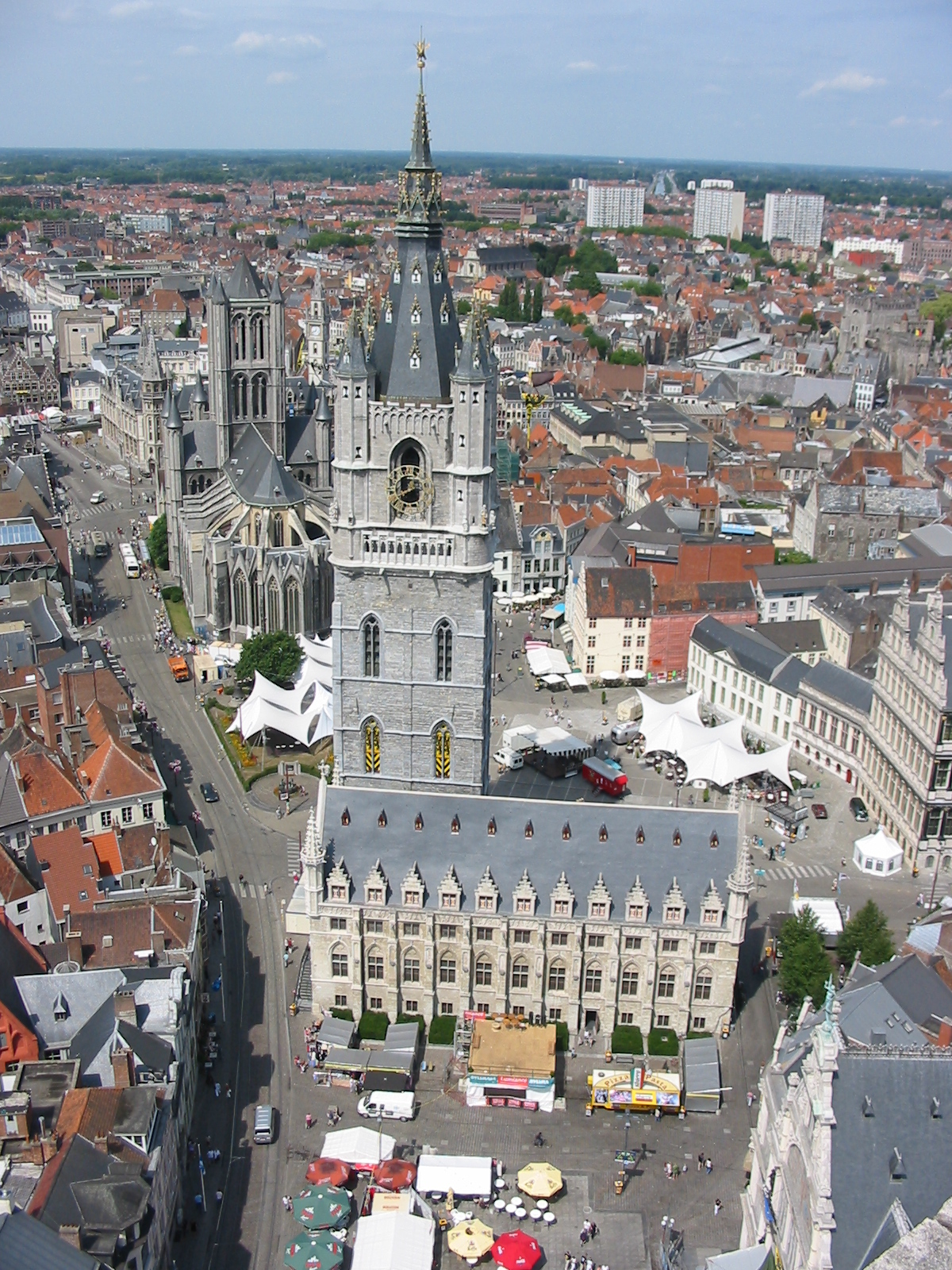 Belfort van Gent, foto door mezelf genomen vanop de Sint-Baafskathedraal